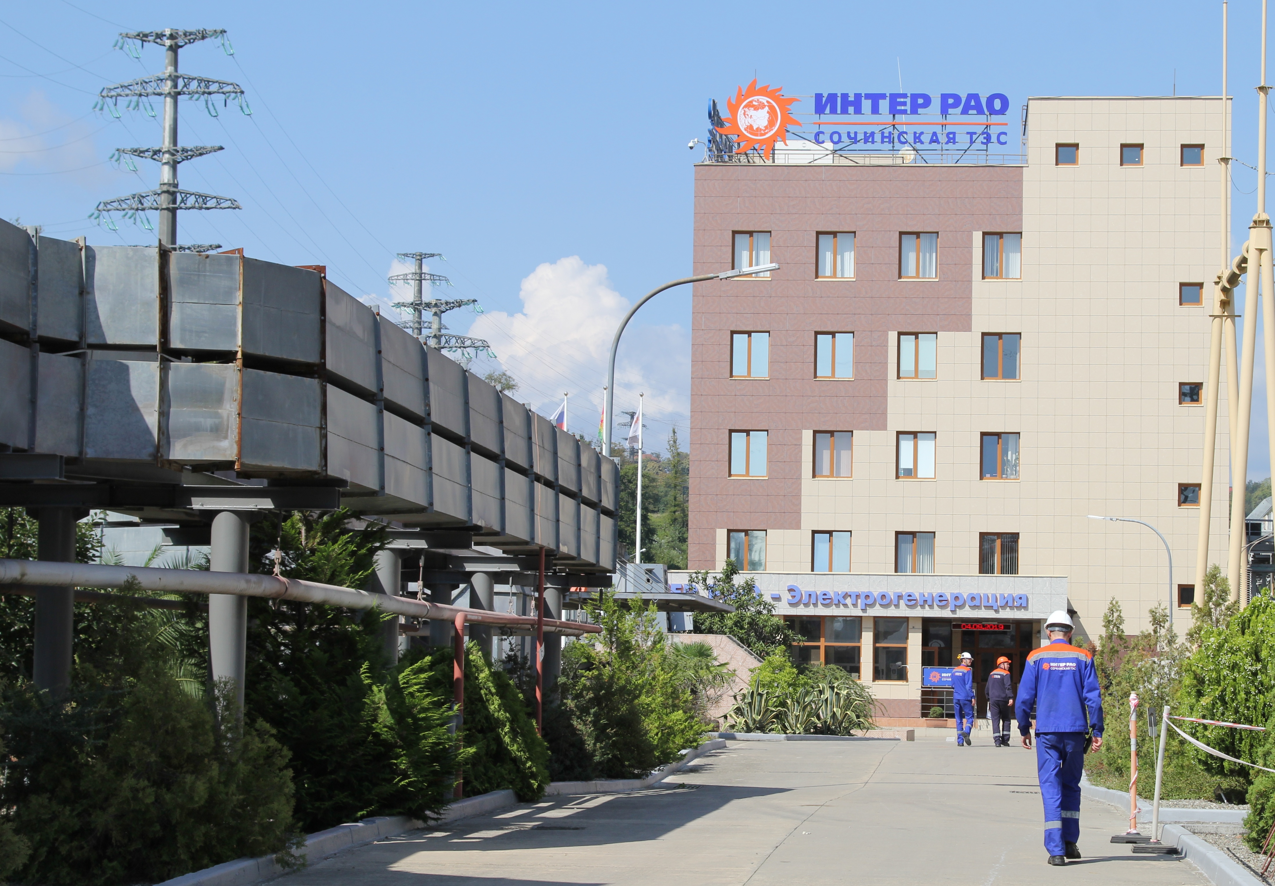 Сочинская ТЭС